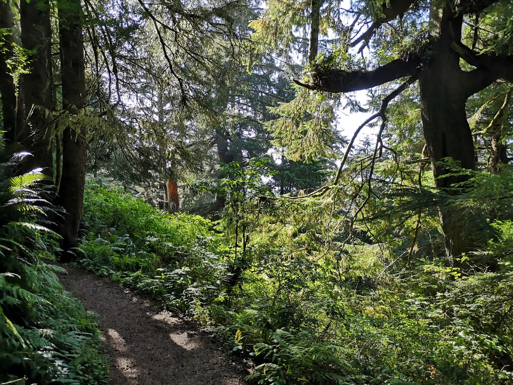 Urwald